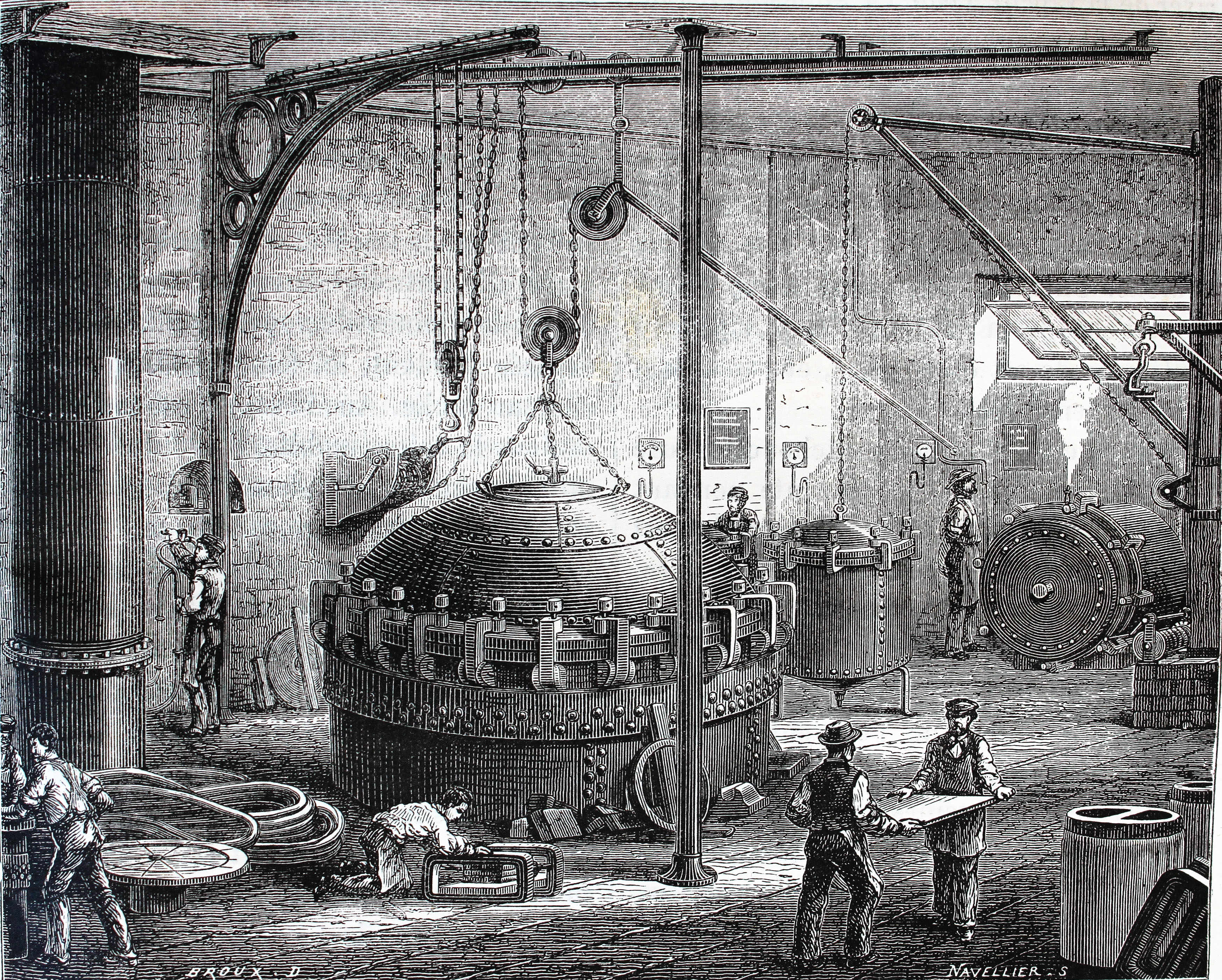 Ilustraciones de la obra : Les merveilles de l'industrie ou, Description des principales industries modernes / par Louis Figuier. - Paris : Furne, Jouvet, [1873-1877]. - Tome II